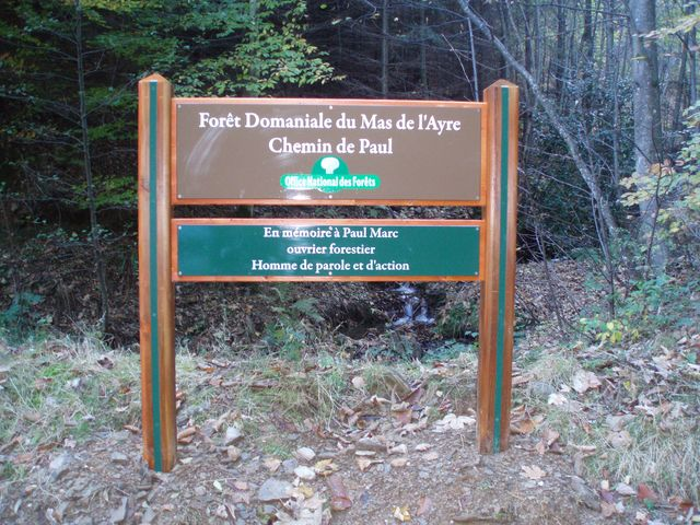 Le Chemin de Paul Marc a été inauguré par l'Office National des Forêts en 2008.